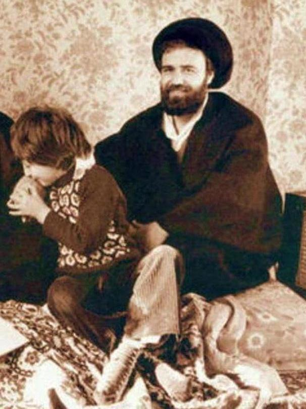 احمد خمینی و دومین پسرش یاسر در فرانسه.